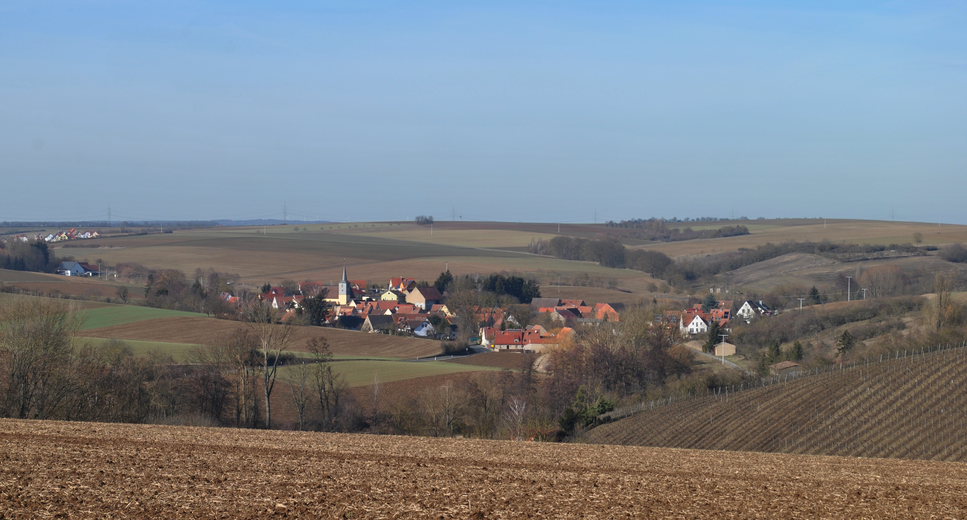 Brück, Ortsteil von Dettelbach von Südosten aufgenommen, Lage in der Gäufläche im nördlichen Maindreieck